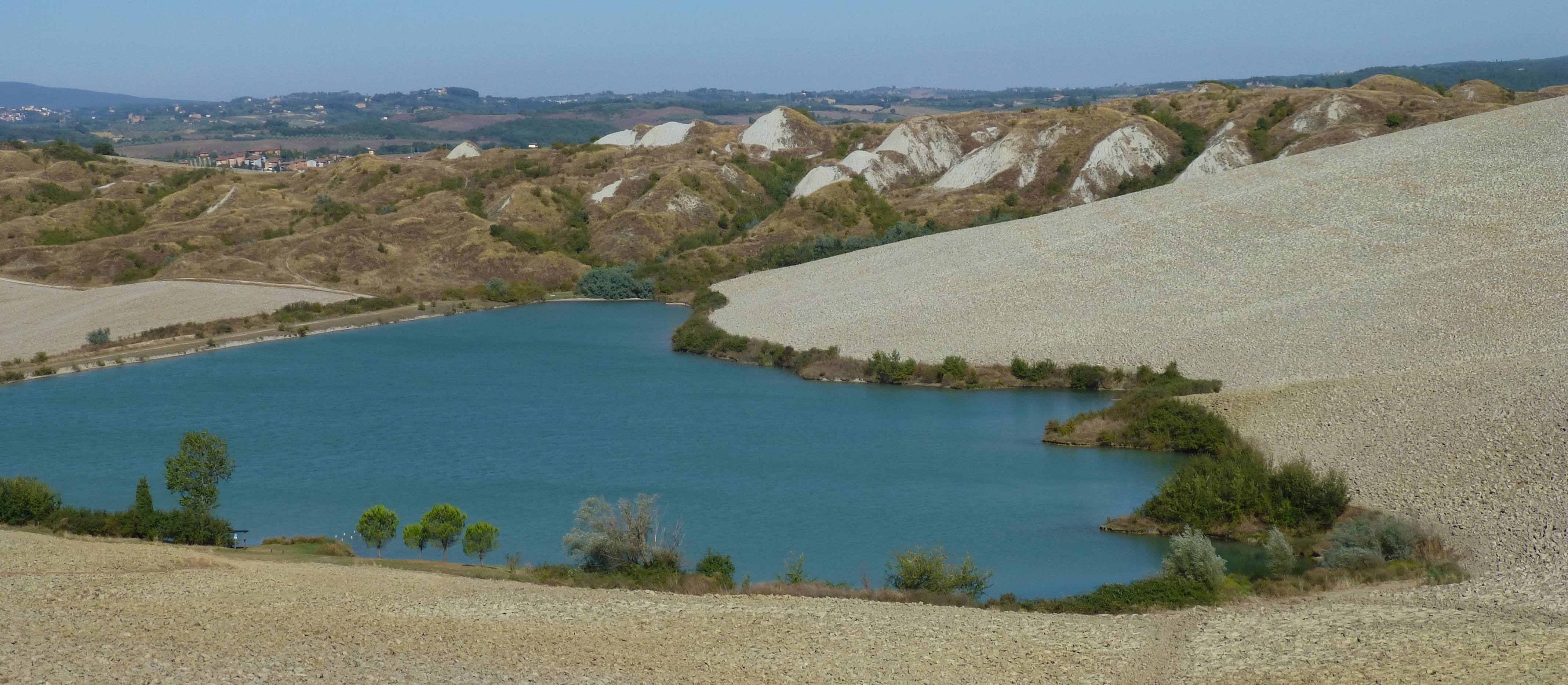 Le Fiorentine Slope view from Leonina/Mucigliani during field studies in 2014-17